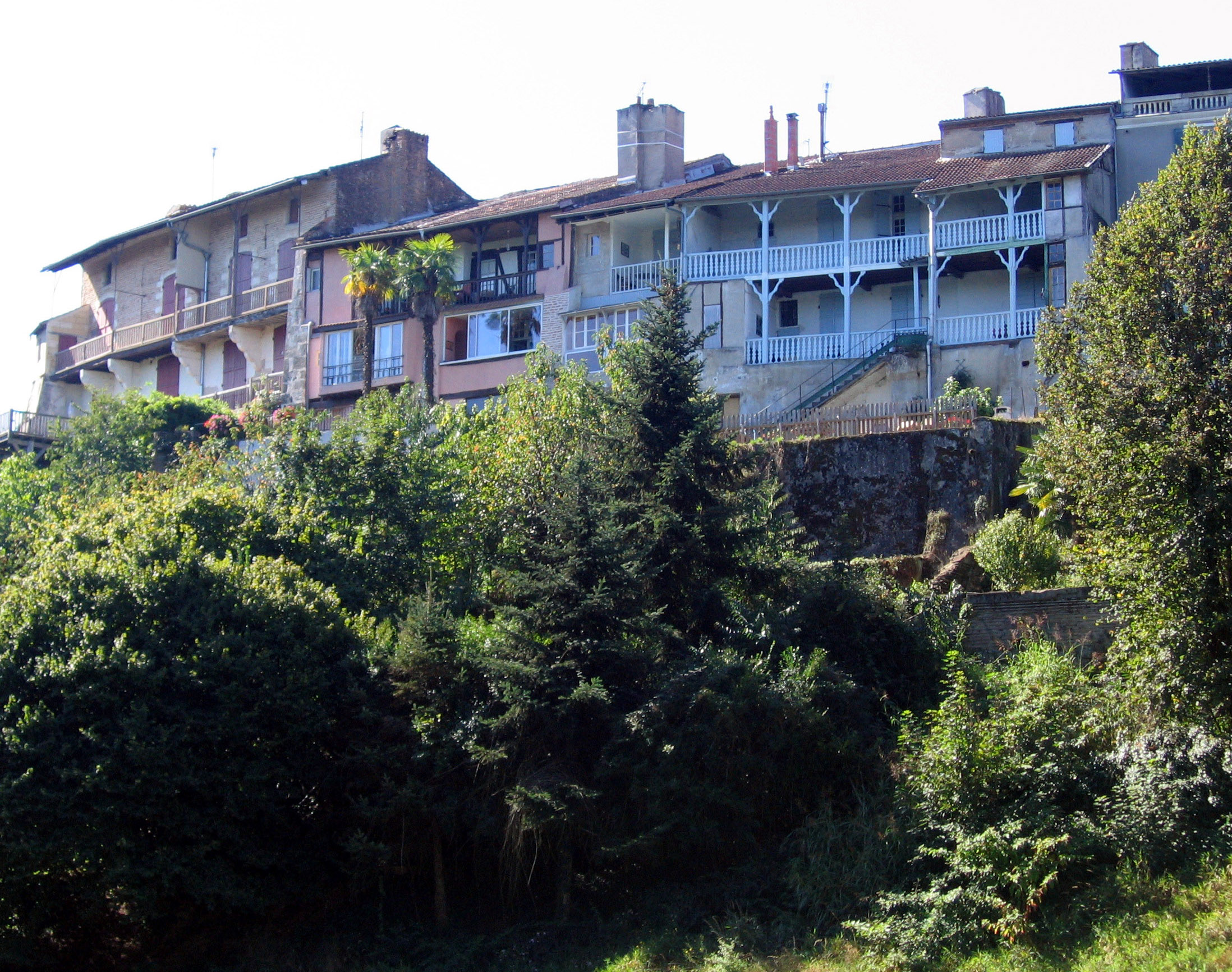 Vue du Mas-d'Agenais prise du port sur le canal latéral à la Garonne.